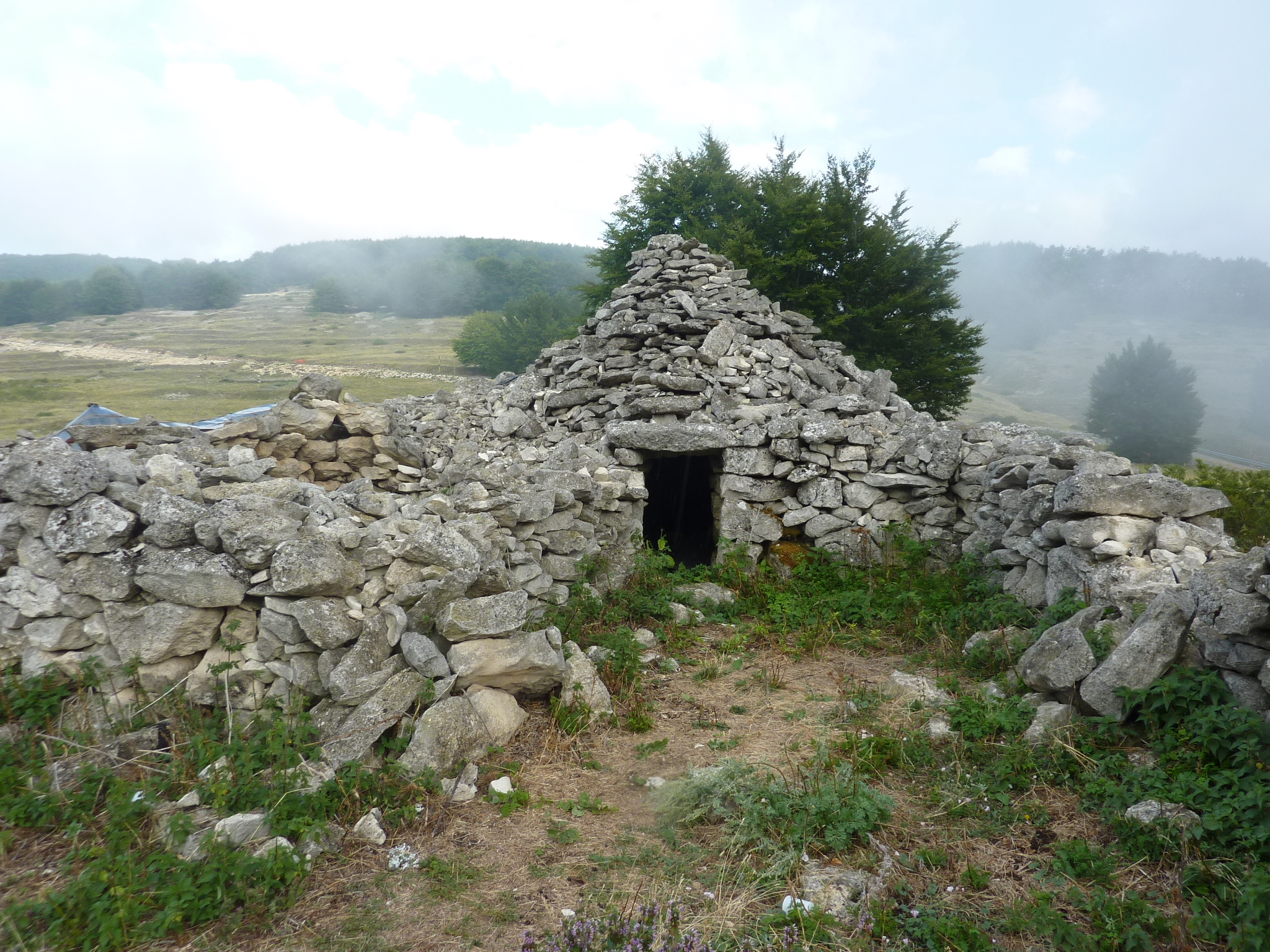 Roccamorice: Thòlos